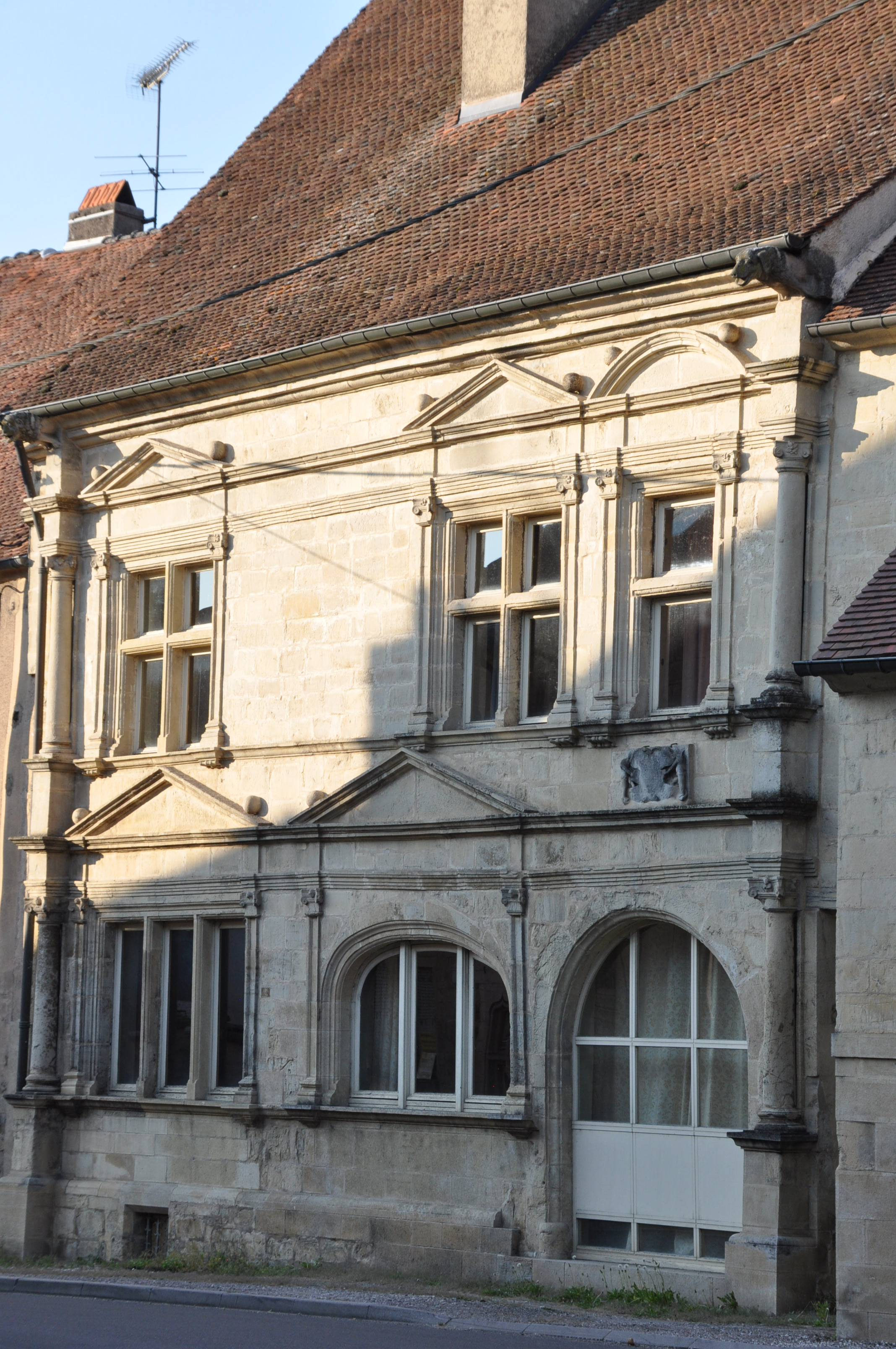 Maison Bucheron, (Classé, 1991) .